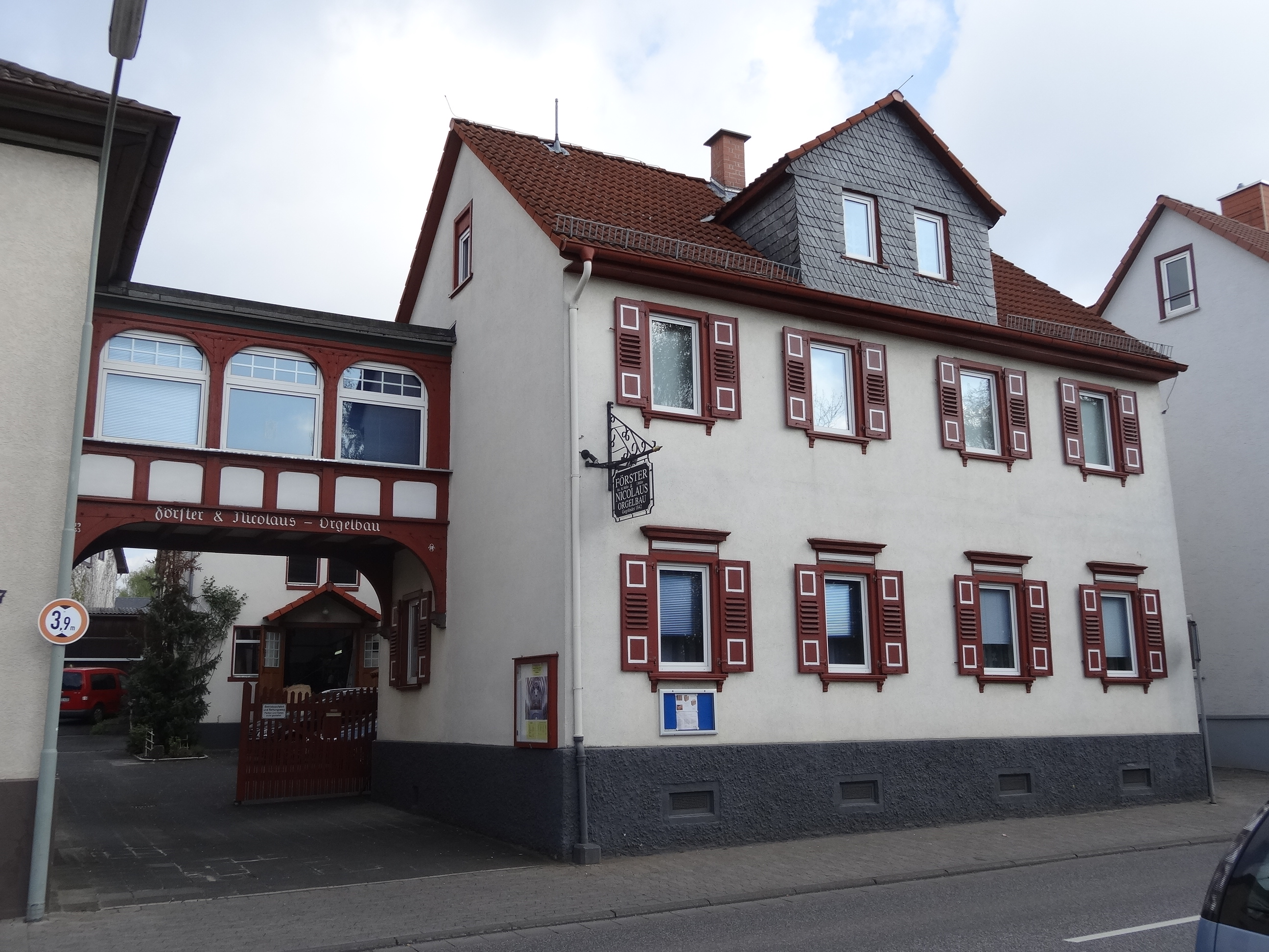 Kolnhäuser Straße 5-7 (Lich)